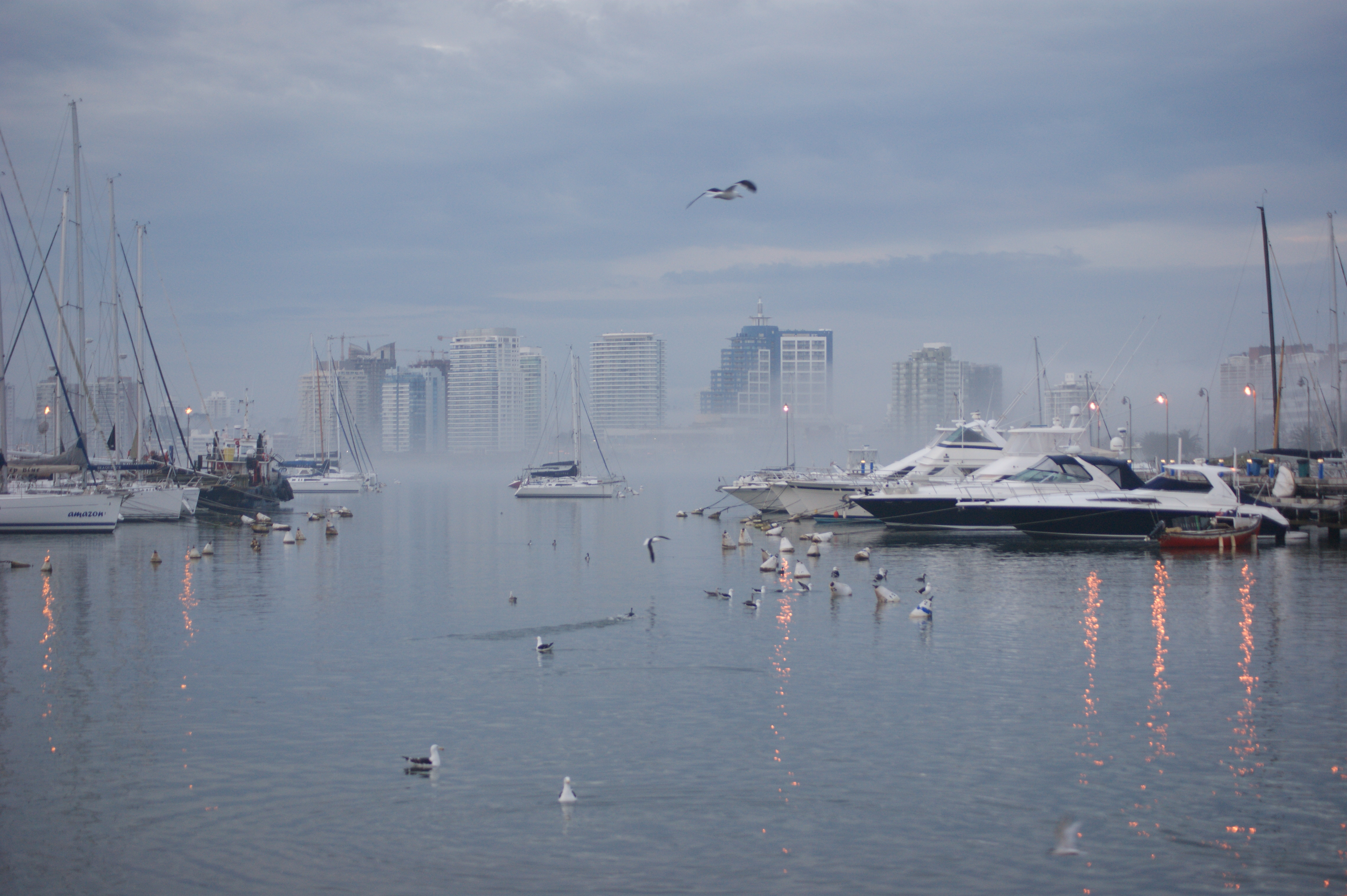 Puerto de Punta del Este